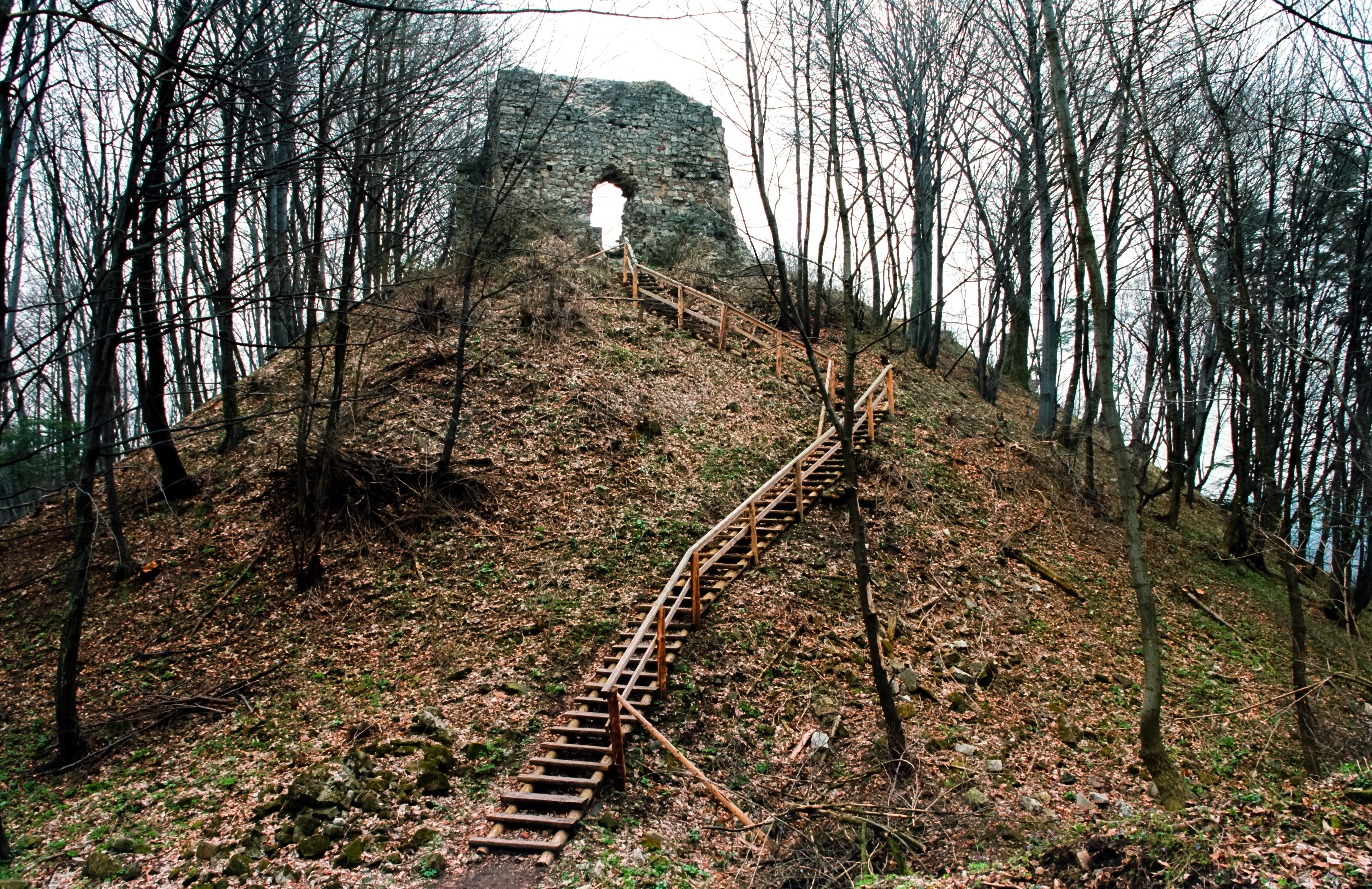 Sobień